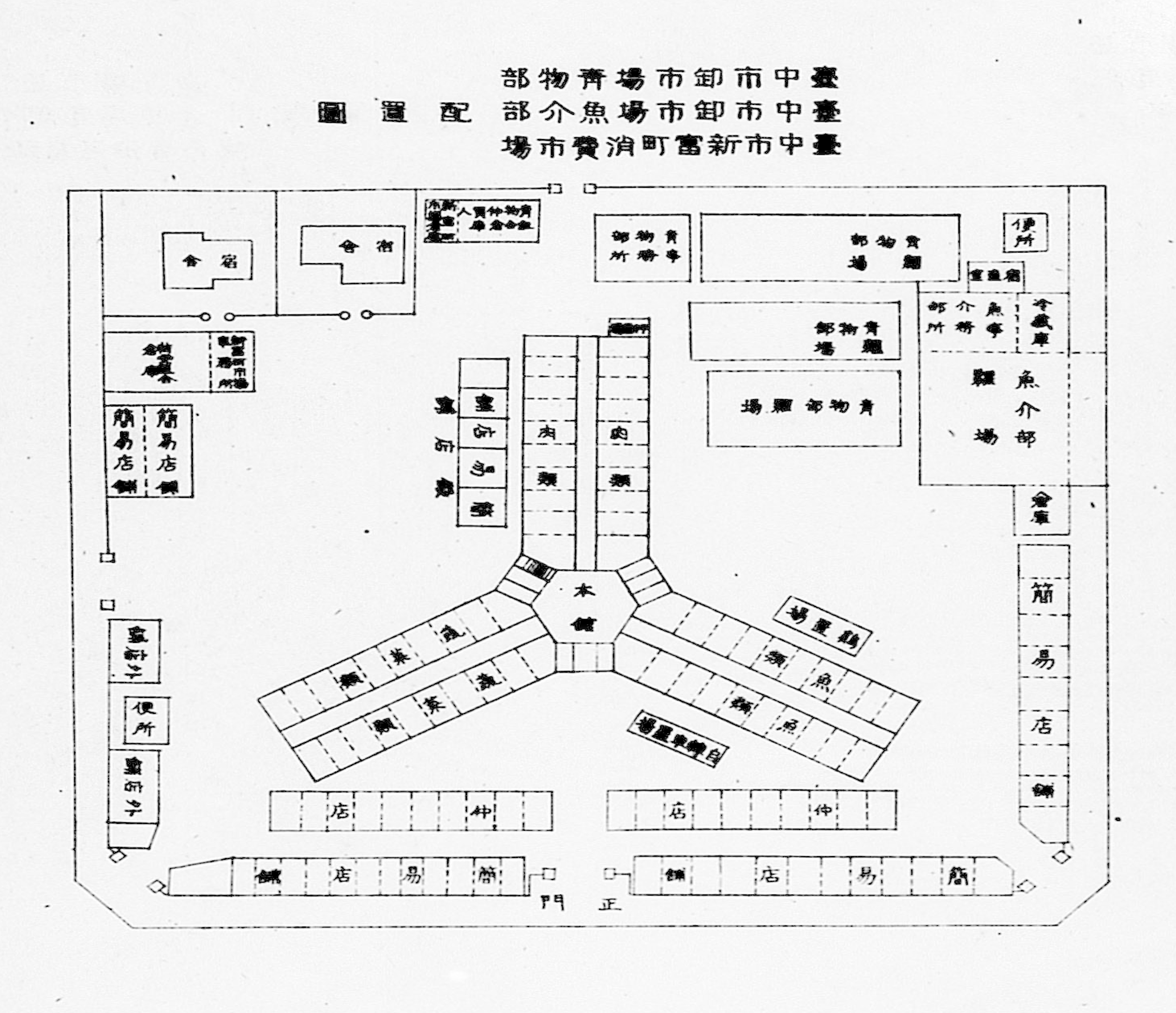 臺中市新富町消費市場為現今臺中市第二市場